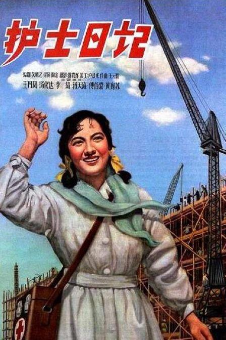 护士日记 cover [1]